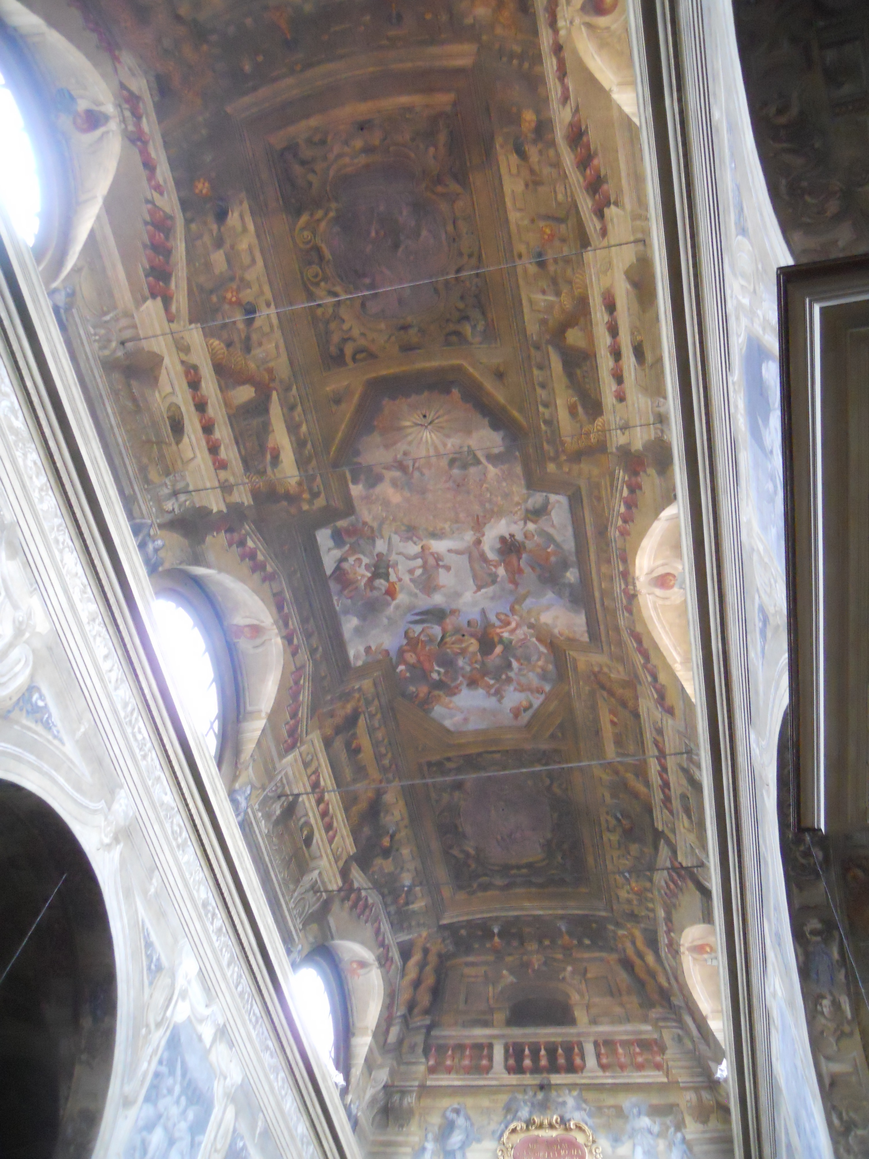 San Faustino maggiore (Brescia) (affresco navata)